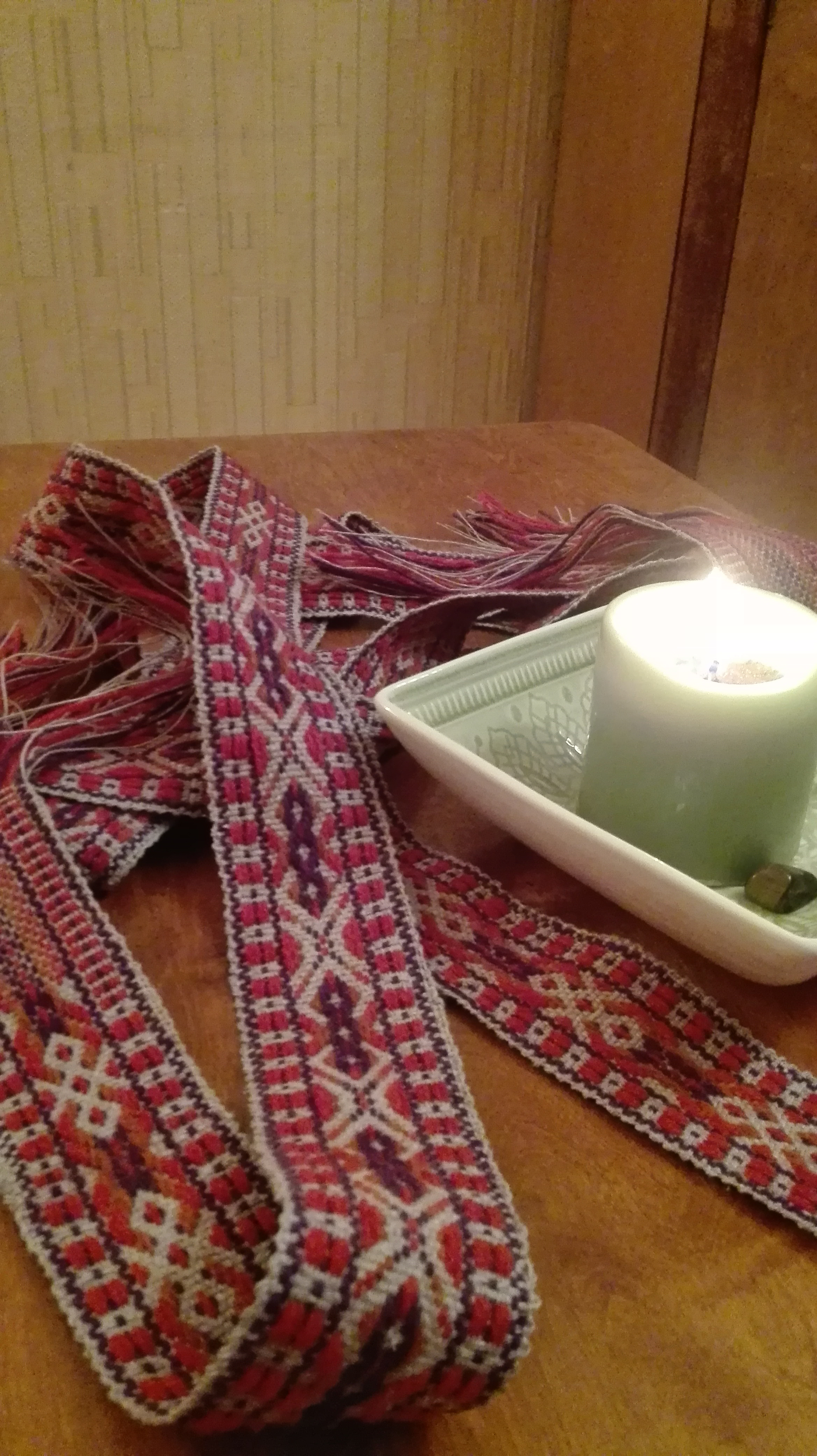 Sangaste kihelkonna muster.